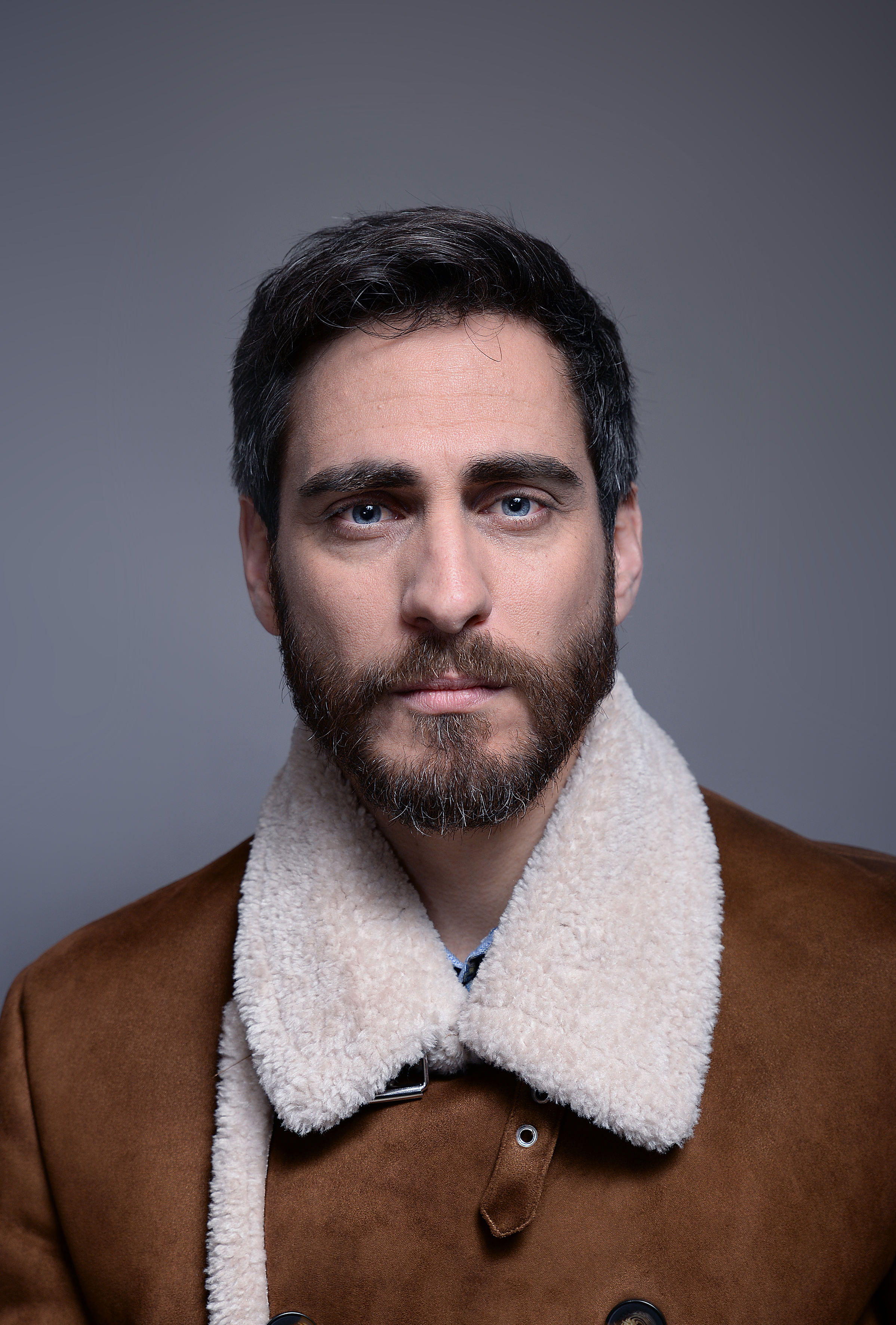 Raül Tortosa